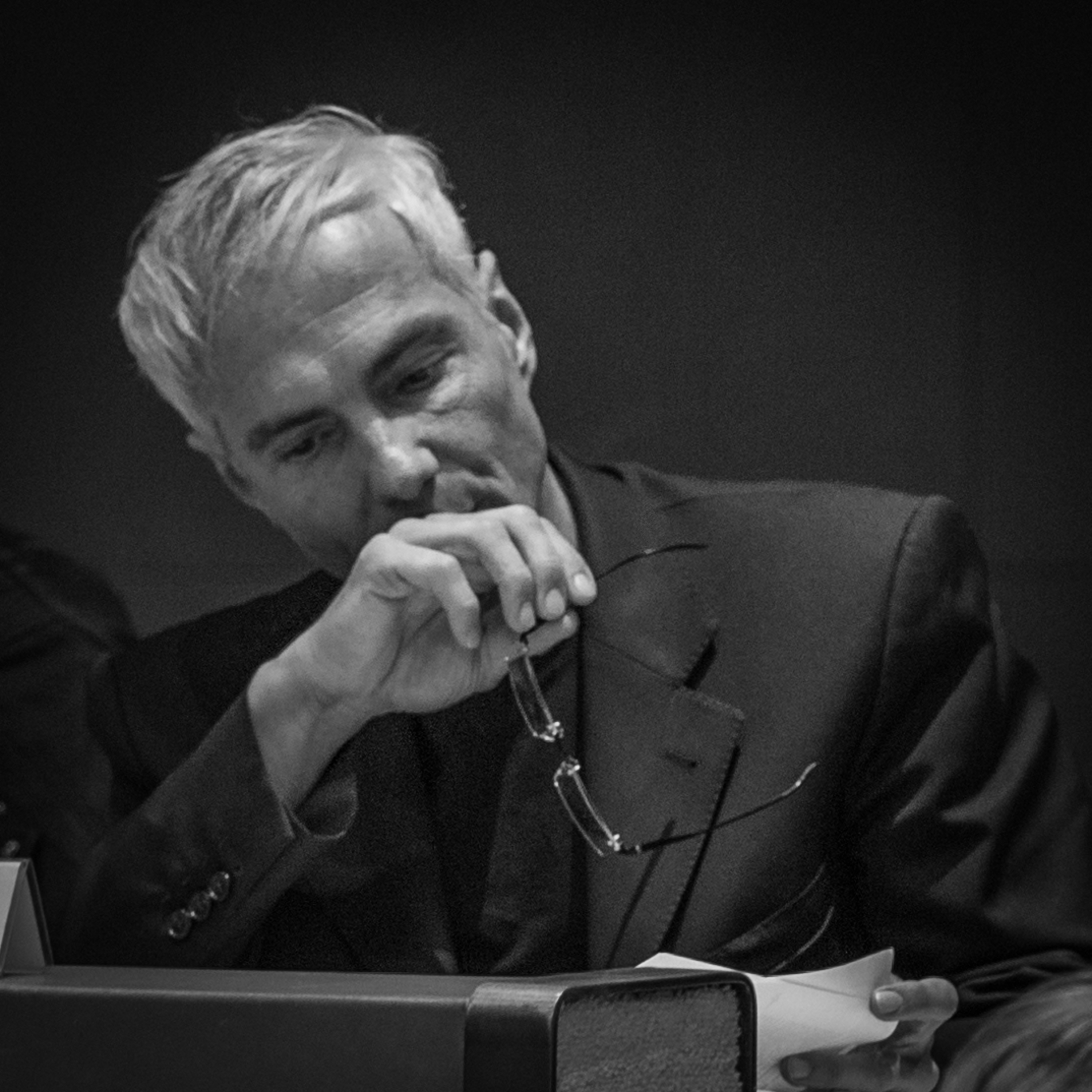 Marc Merger au Conseil municipal de Strasbourg du 24 juin 2013.